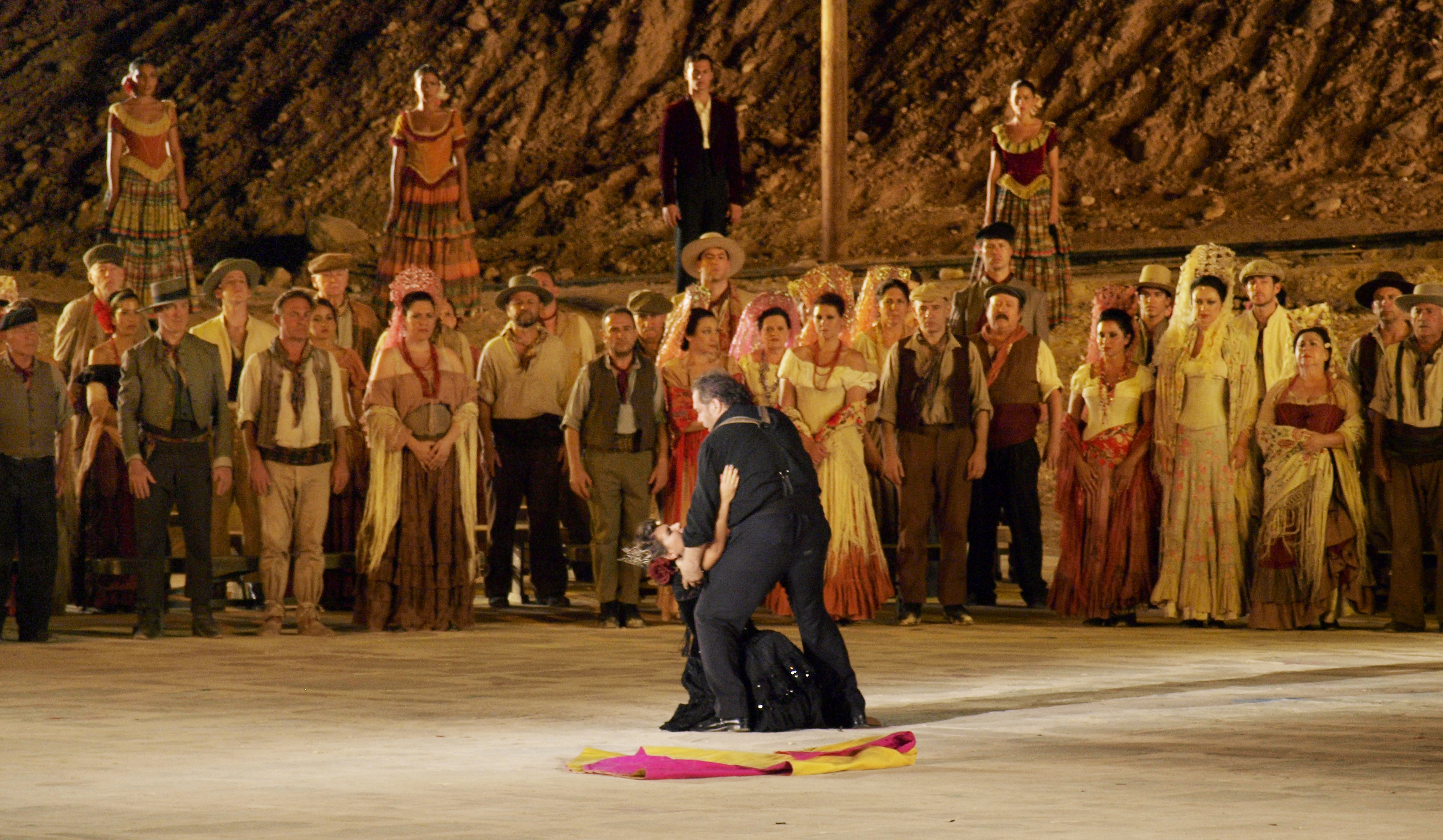 Carmen on Masada